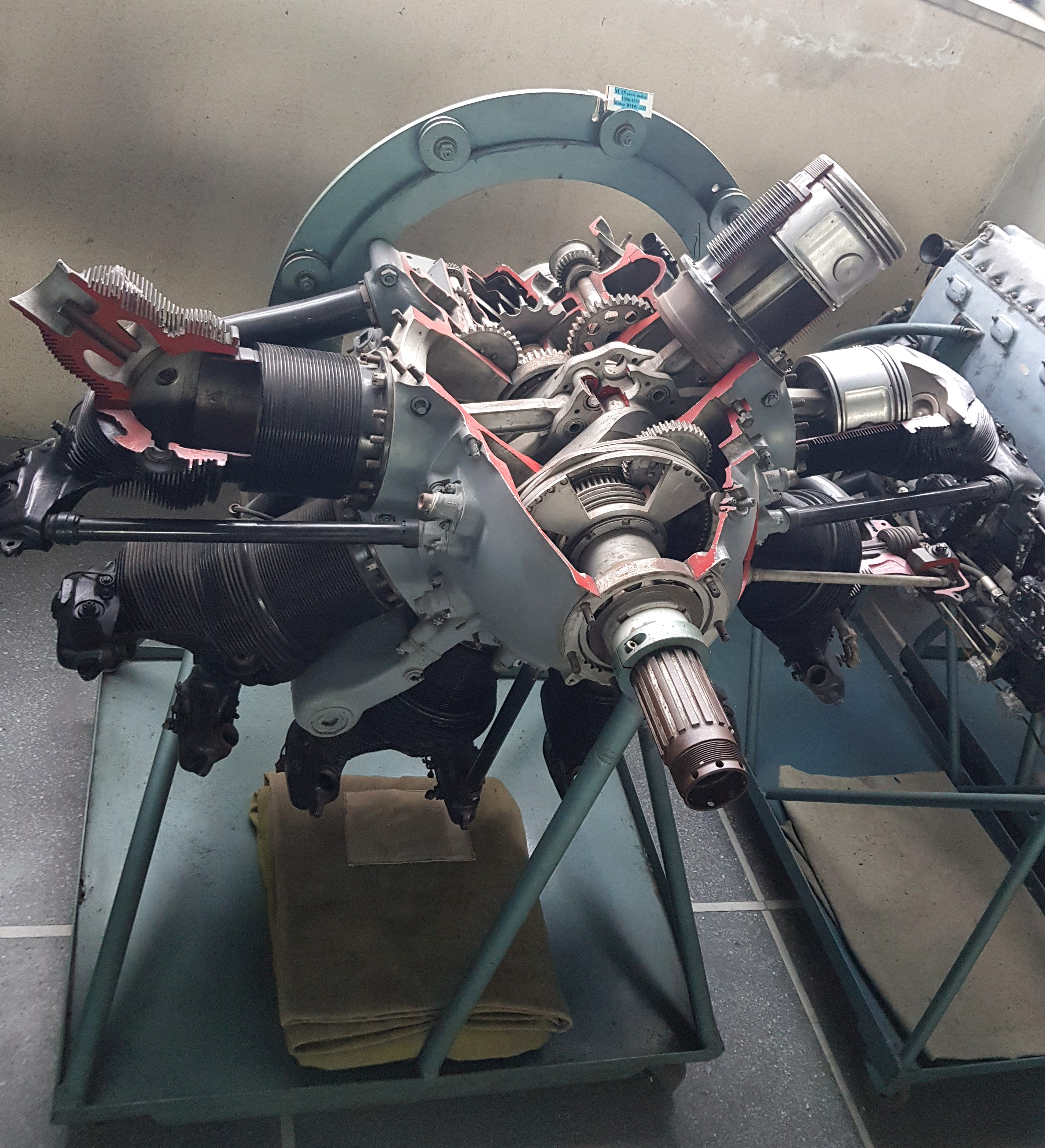 Aufgeschnittener Flugzeugmotor BMW-132 „M15 serie 1356/1320“ im Militärmuseum Bukarest.